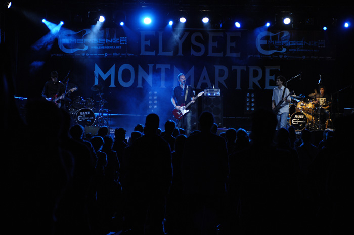 Soirée Emergenza à l'Elysée Montmartre